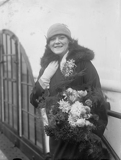 Frieda Hempel (1885-1955), German soprano